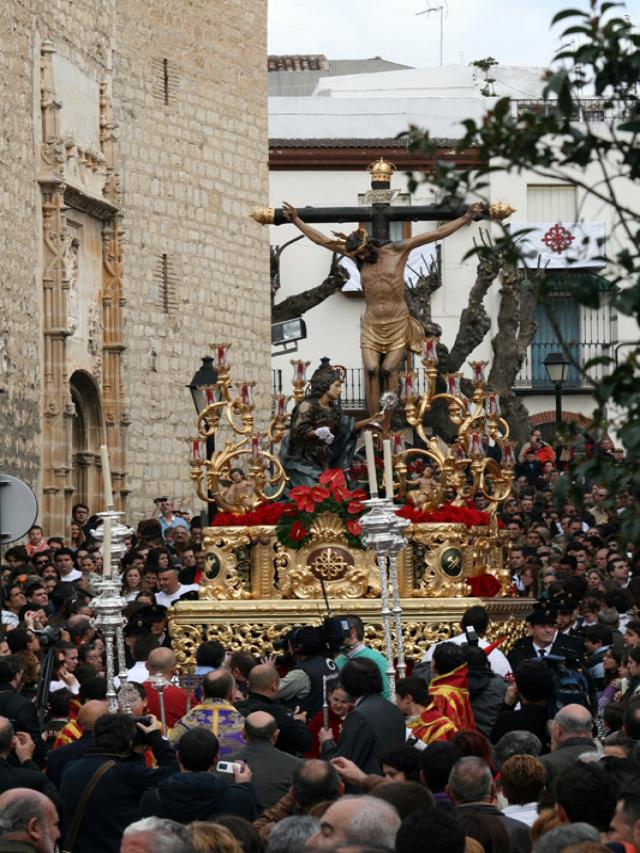 Cristo de la Clemencia